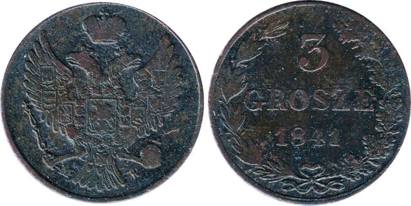 3 grosze 1841